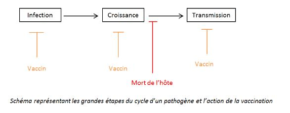 Cycle pathogene et stades d'action de la vaccination